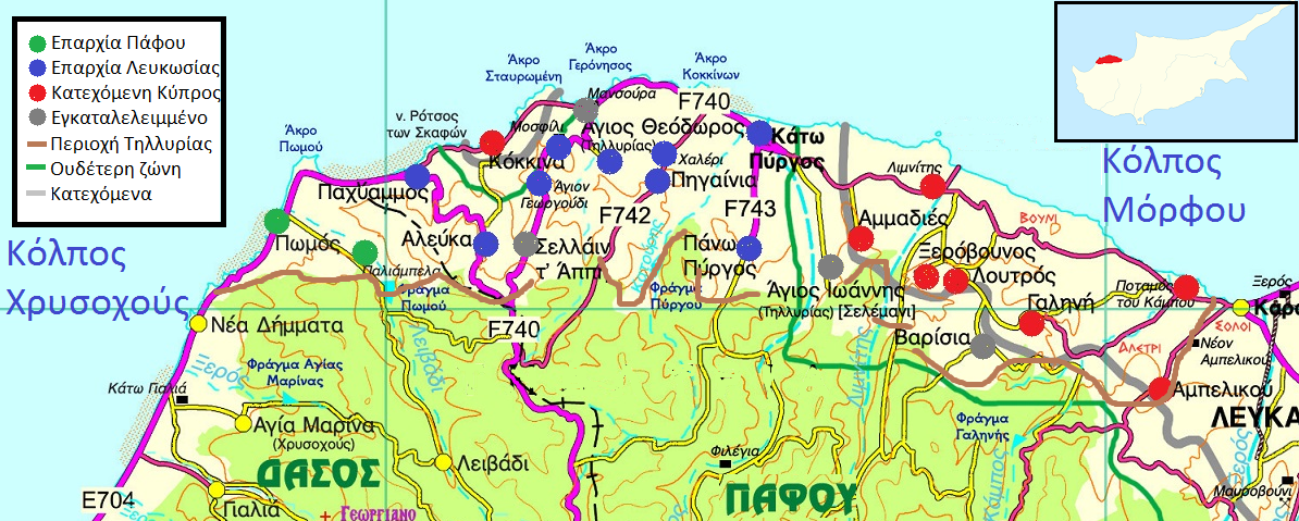 Η χερσόνησος της Τηλλυρίας